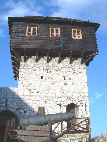 Kula dobojske tvrđave.